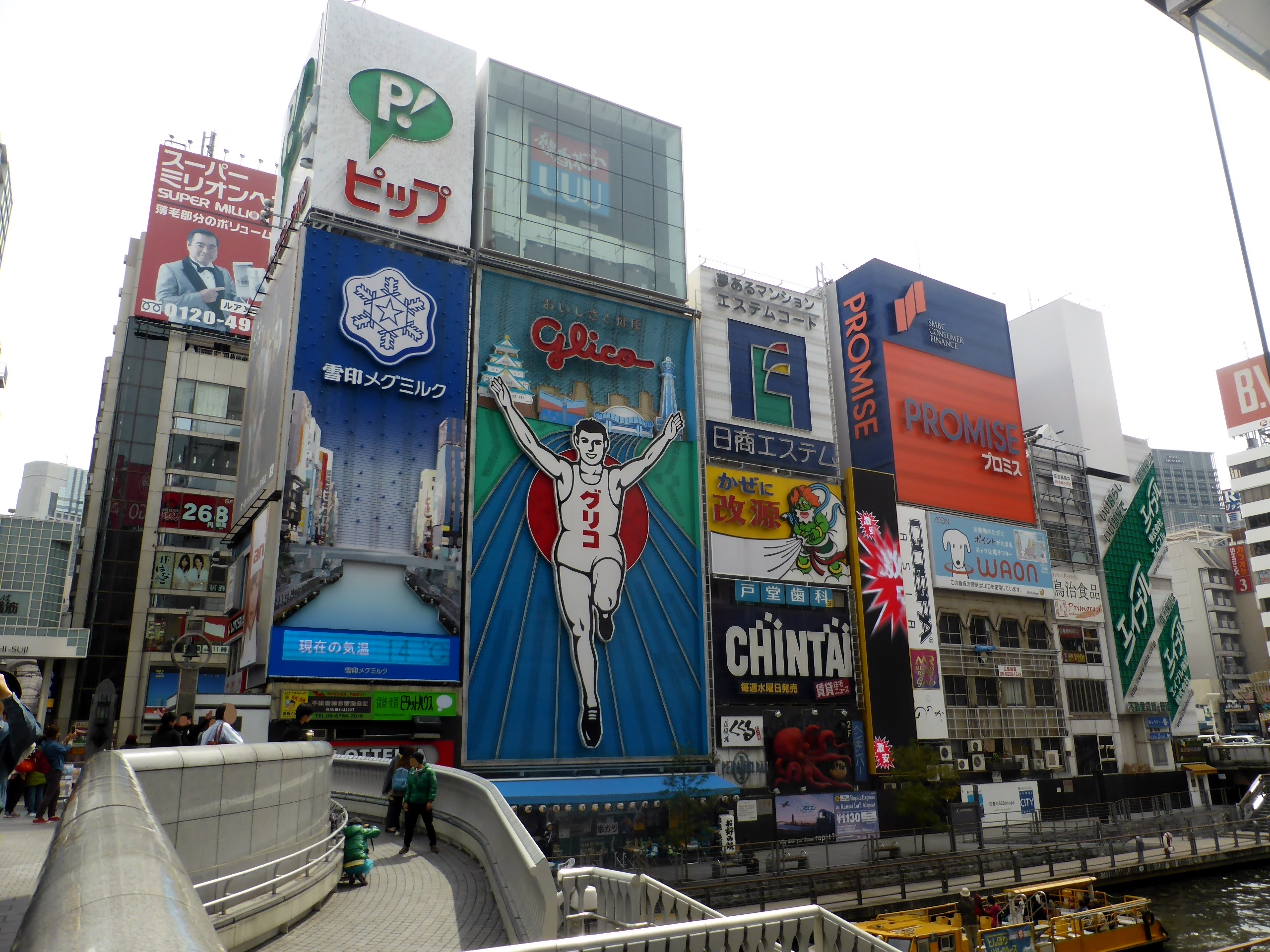 道頓堀のネオンサイン群を撮影。